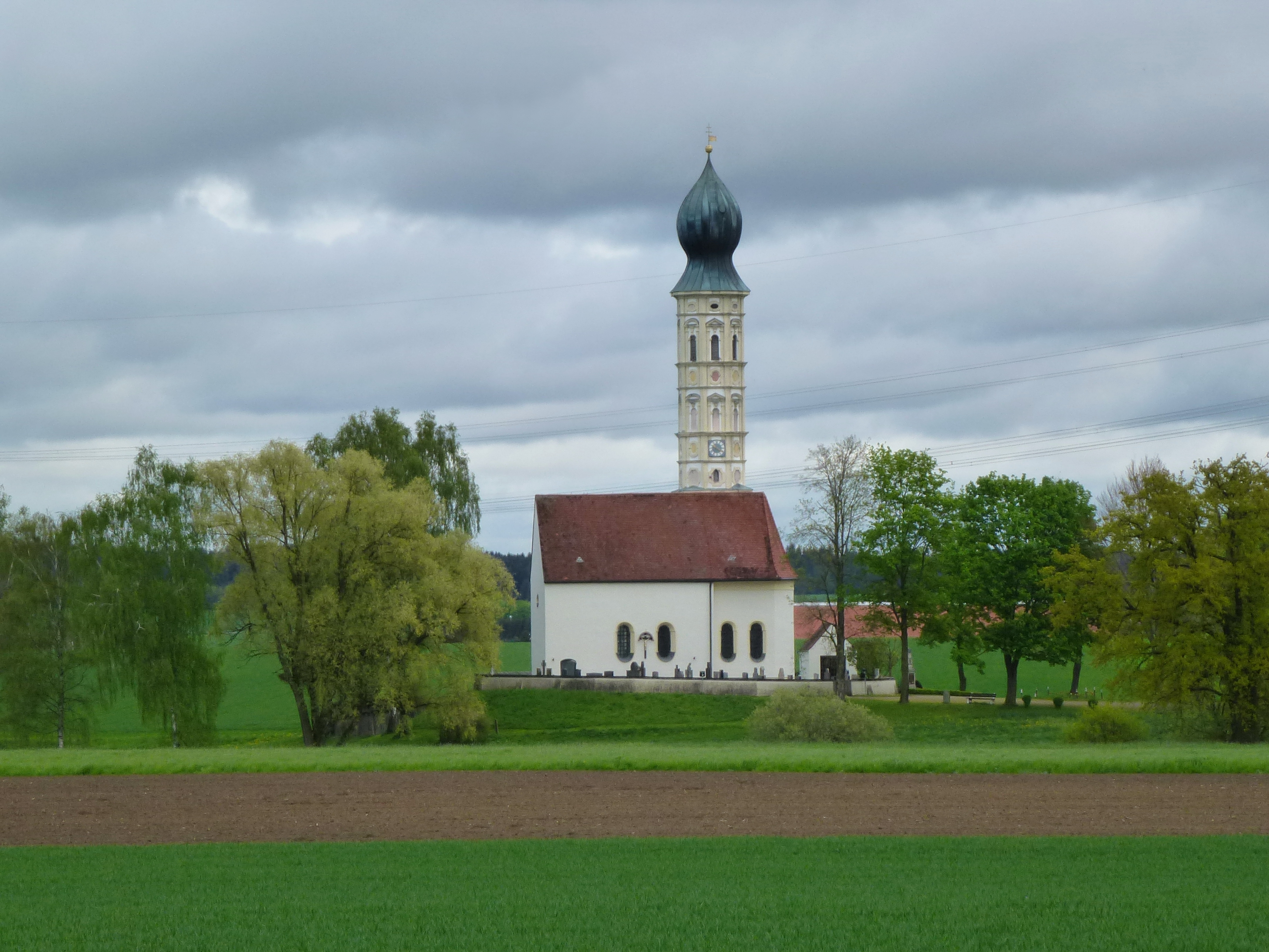 Puchschlagen (Gde Schwabhausen), Katholische Filialkirche St. Castulus, Ansicht von SSW